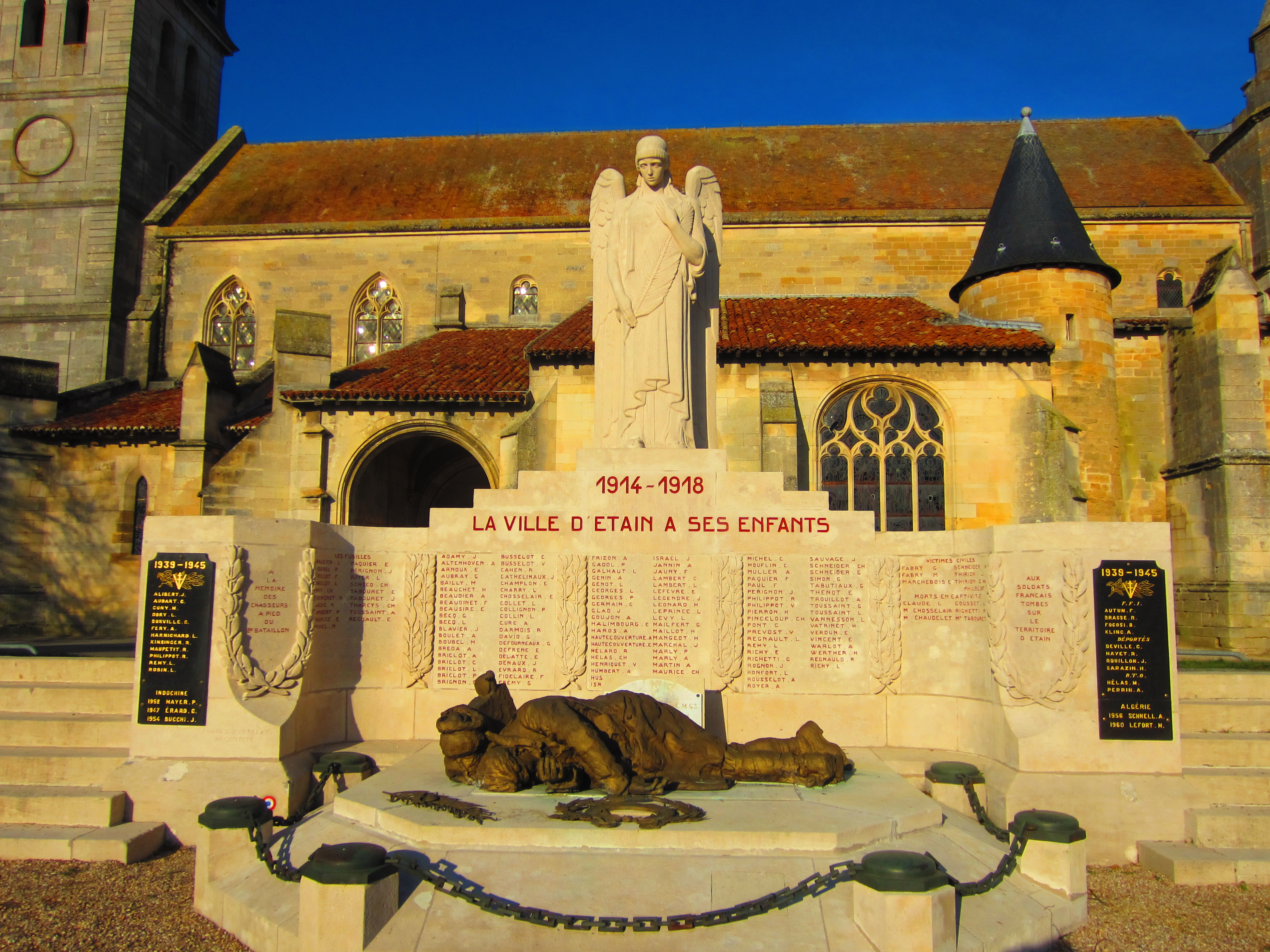 Étain Monument aux morts